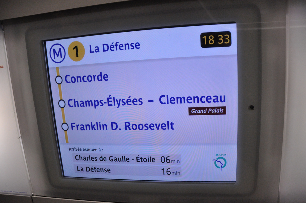 Écran Dilidam dans les navettes MP 05 sur la ligne 1 du métro de Paris.